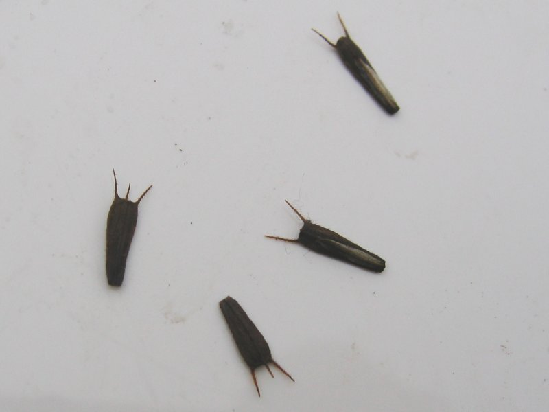 Früchte des Dreiteiligen Zweizahns Bidens tripartita